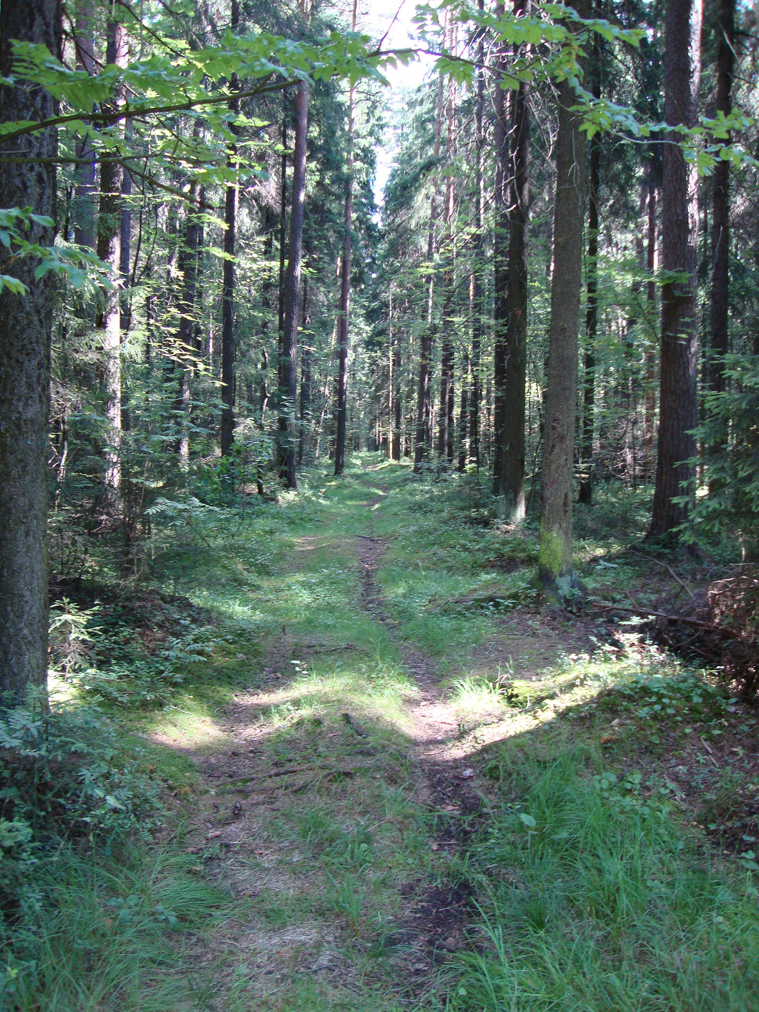 Просека в южной части Жерновского лесничества